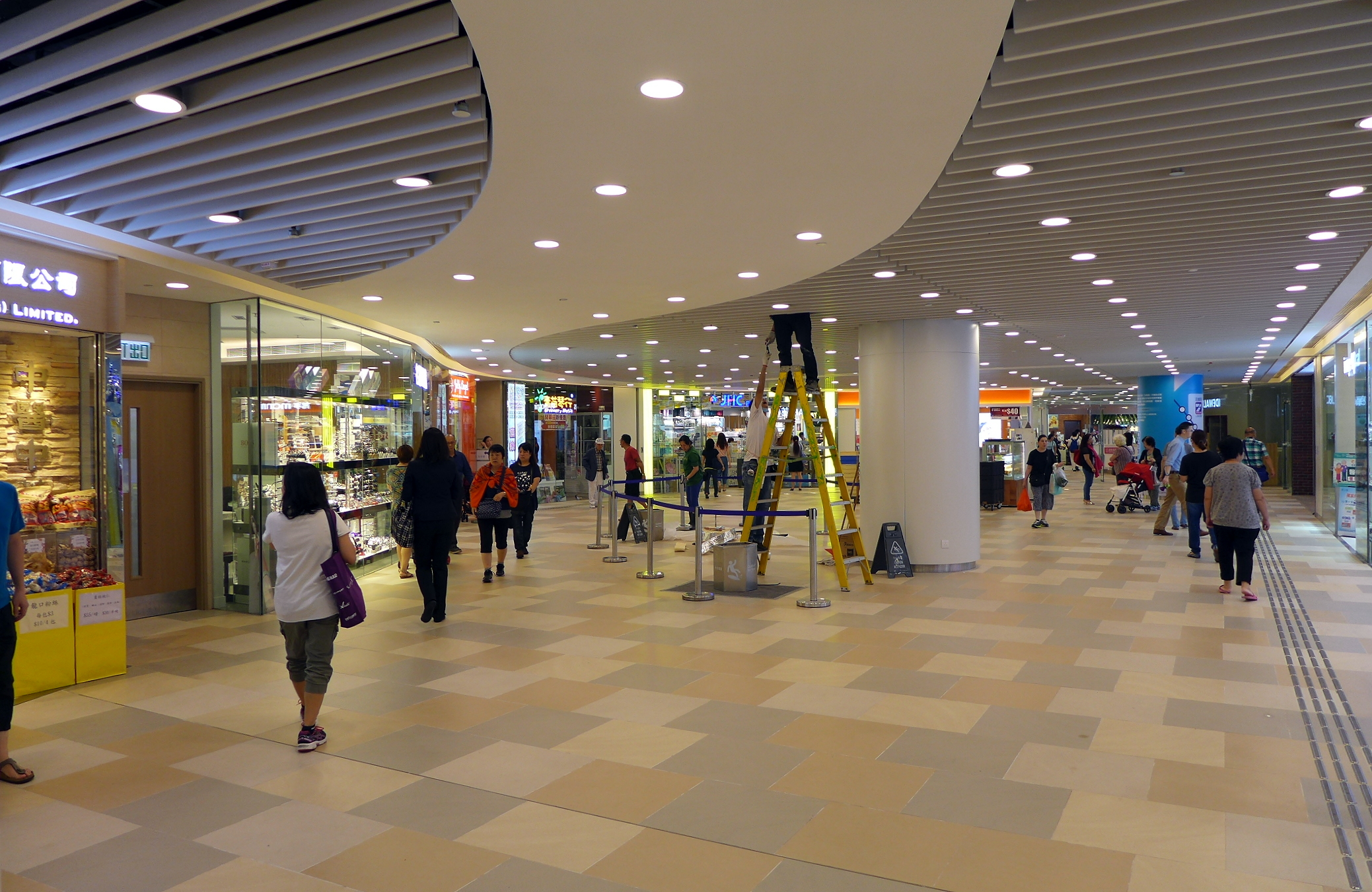 Tin Shing Shopping Centre